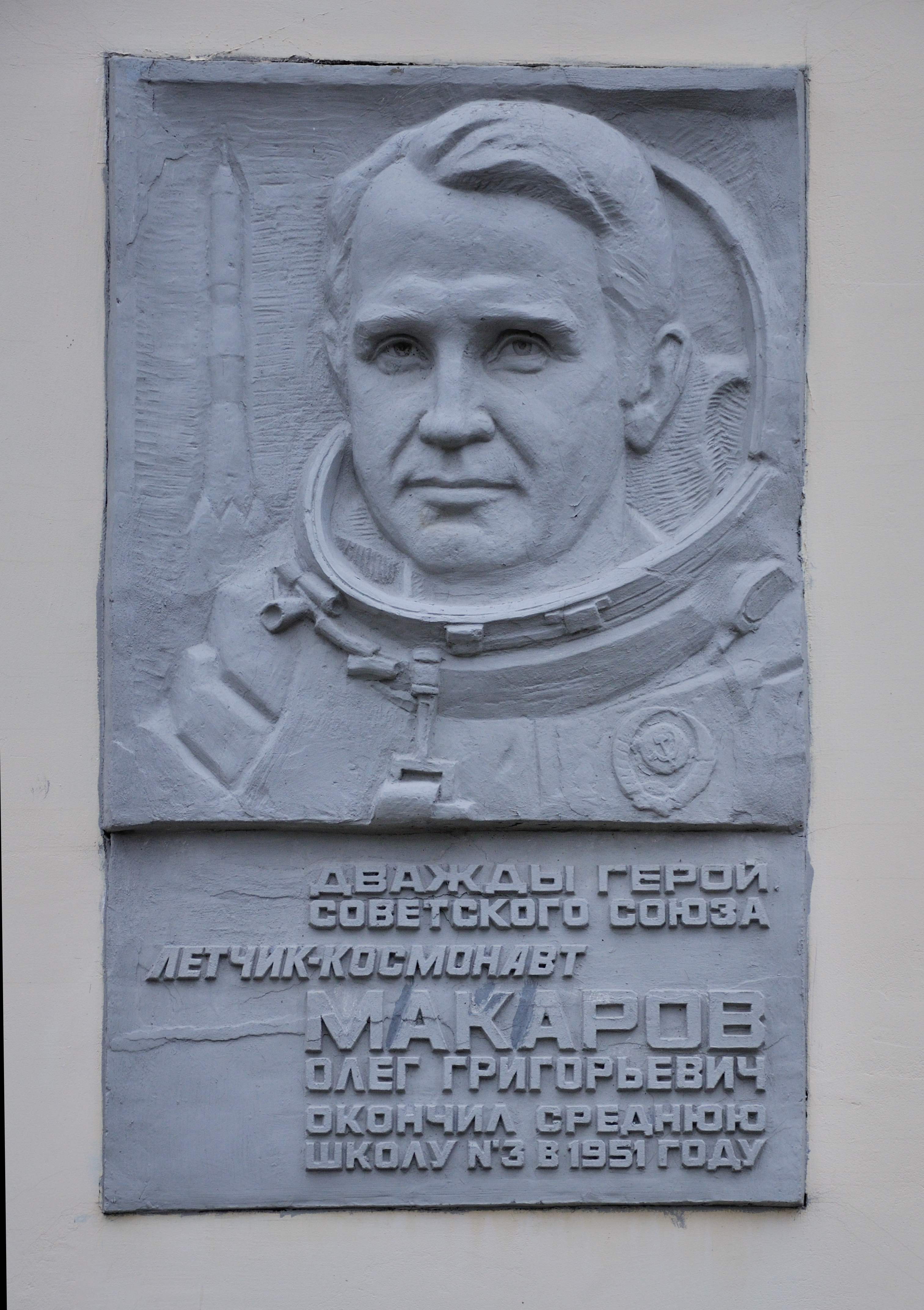 Меморіальна дошка на честь льотчика-космонавта О. Г. Макарова (на школі, в якій він навчався у 1948–1951 р.р.), Рівне, вул. Маяковського, 13